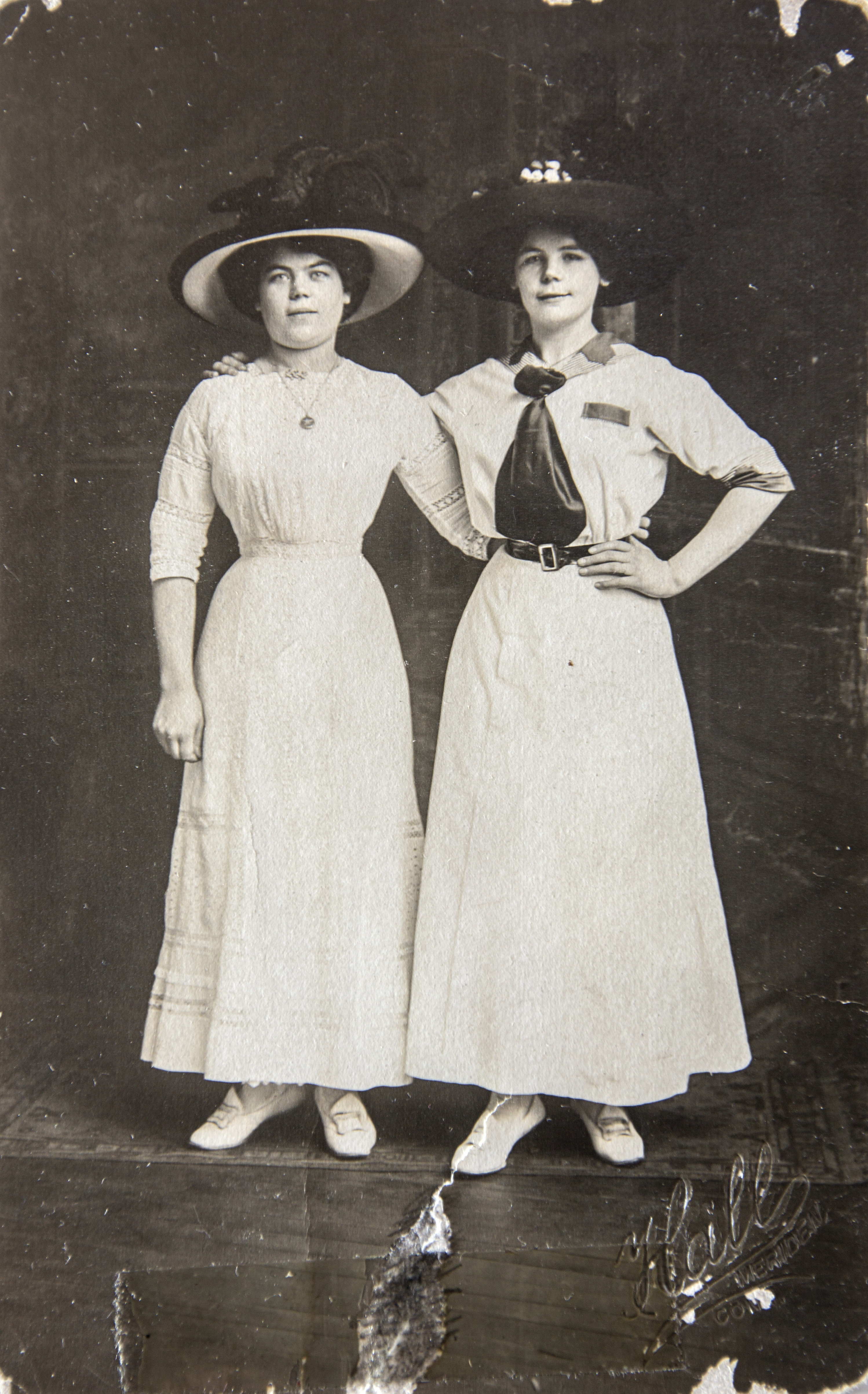 Olga Lundin, överlevare från Titanic, tillsammans med sin kusin Jenny Lundin.